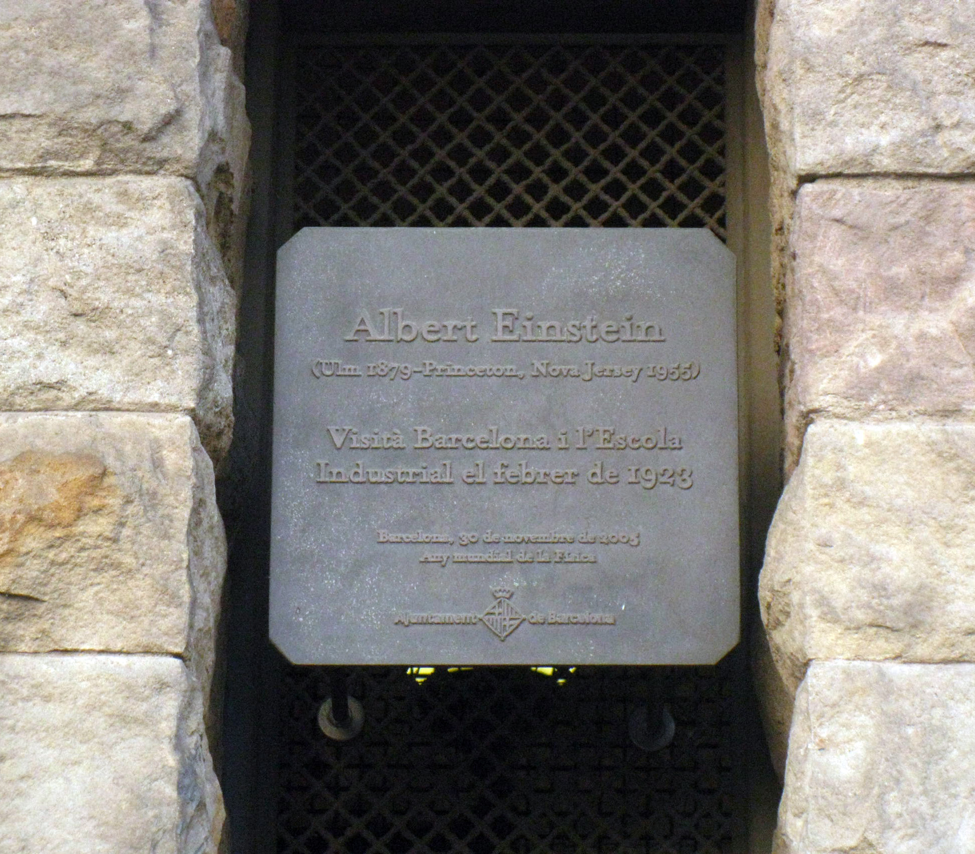 Albert Einstein. C. Comte d'Urgell, 187 -accès principal- (Barcelona)